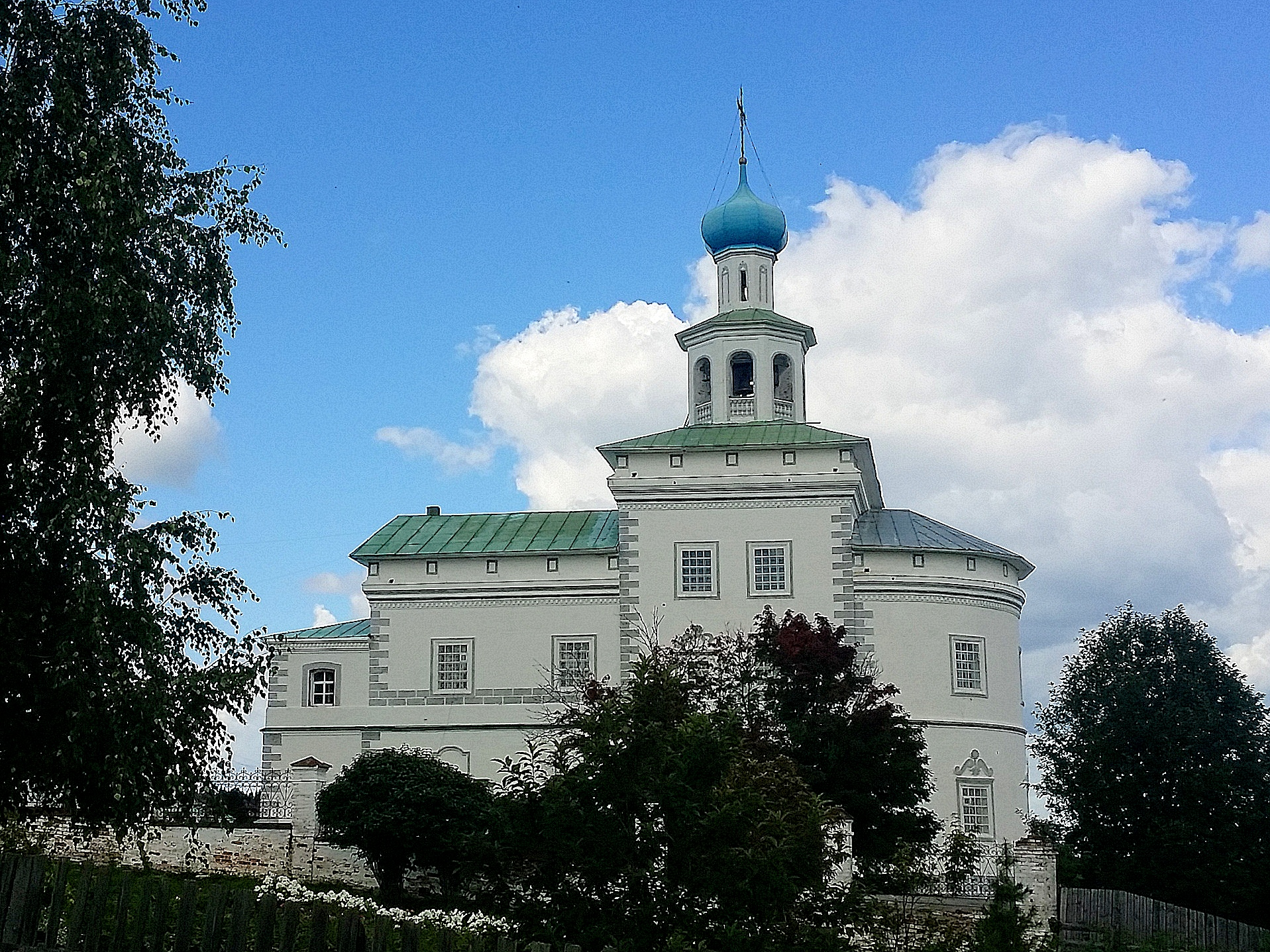 Церковь Иоанна Богослова: улица Мамина-Сибиряка, 15-17, Чердынь, Чердынский район, Пермский край